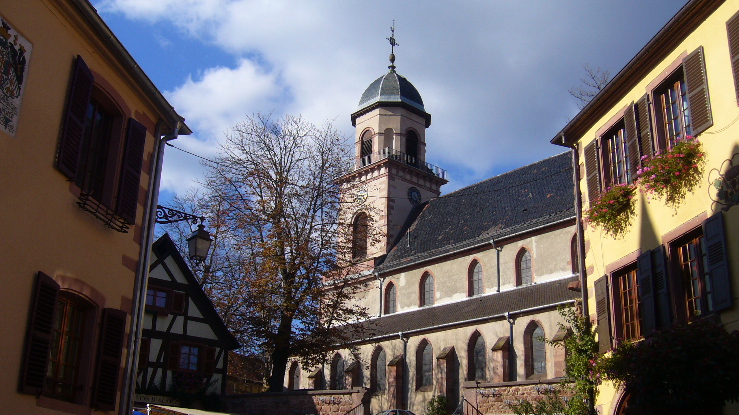 Eglise Saint-Hippolyte